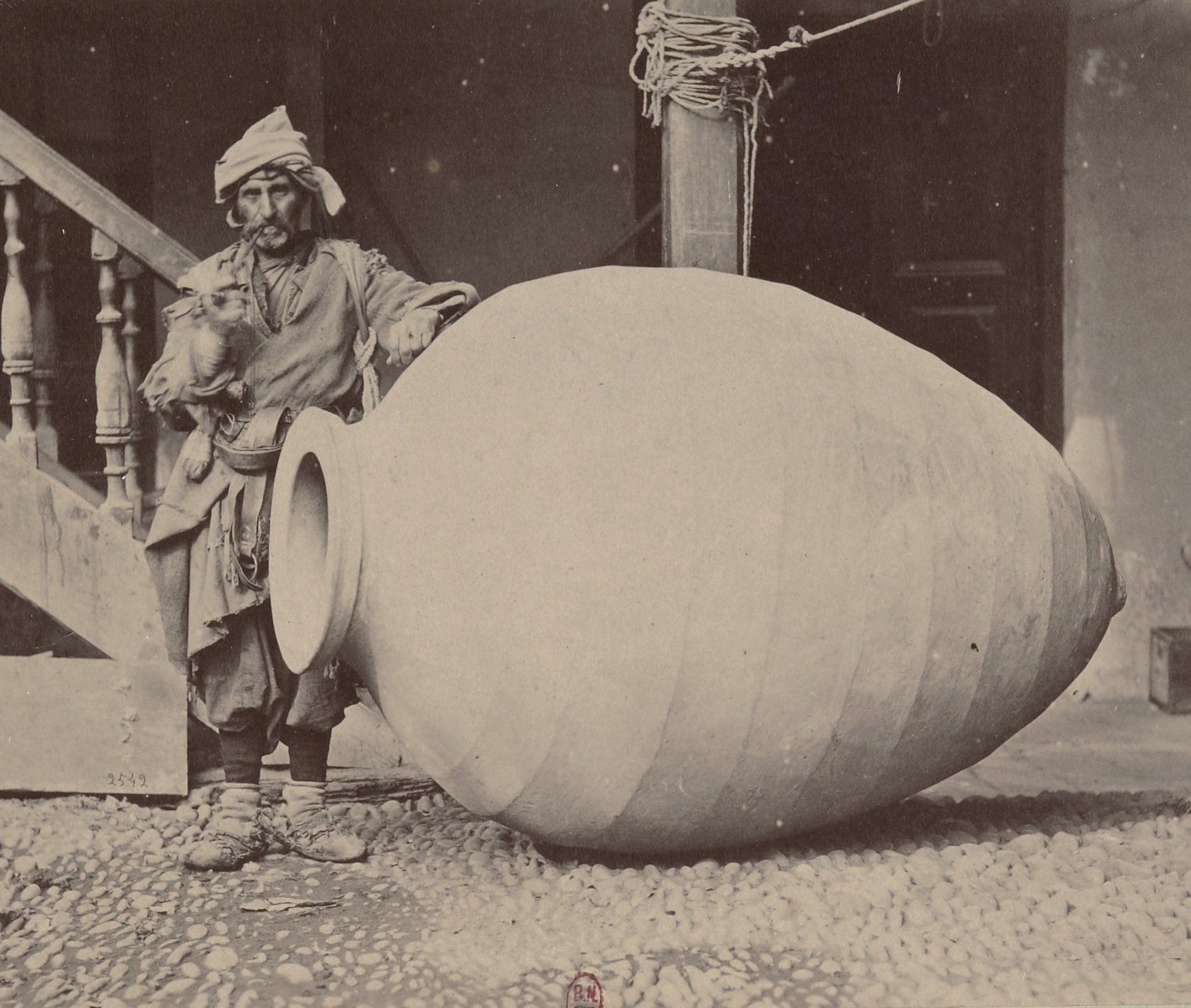 Barry (capitaine). F. 25. Grand vase, pour la conservation du vin en Kacheti Géorgie. Mission scientifique de Mr Ernest Chantre. 1881